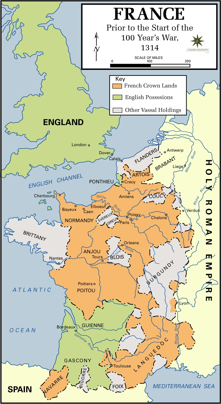 FRANCE Prior to the Start of the 100 Years's War, 1314 : - French Crown Lands - English Possessions - Other Vassal Holdings Source : United States Military Academy